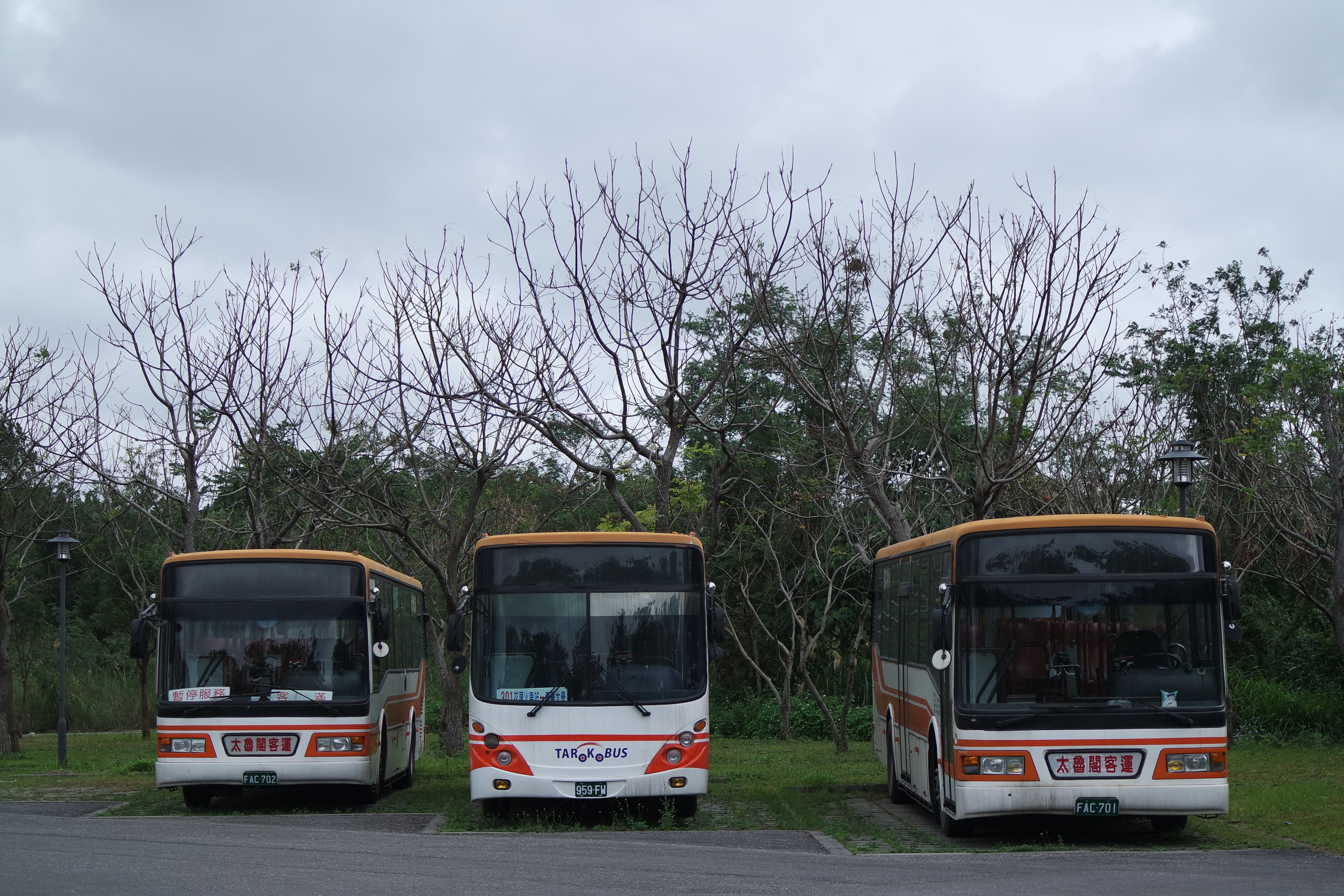 太魯閣客運日野大客車FAC-702、959-FW、FAC-701，攝於國立東華大學。